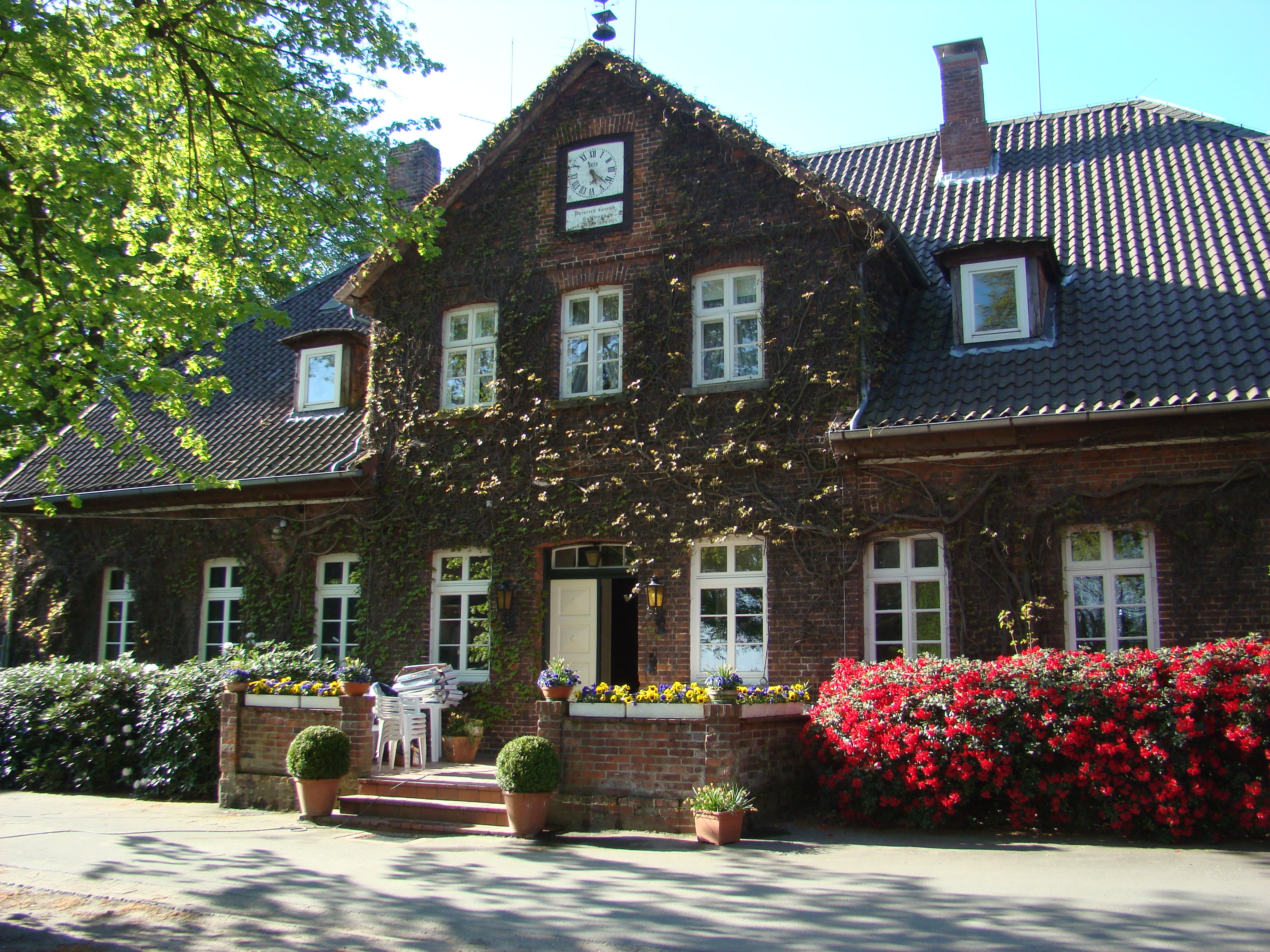 Wohnhaus des „Gut Hagen“ mit alter Giebeluhr Hagen Estate House with an old gable clock, Hagen, Lower Saxony, Germany.